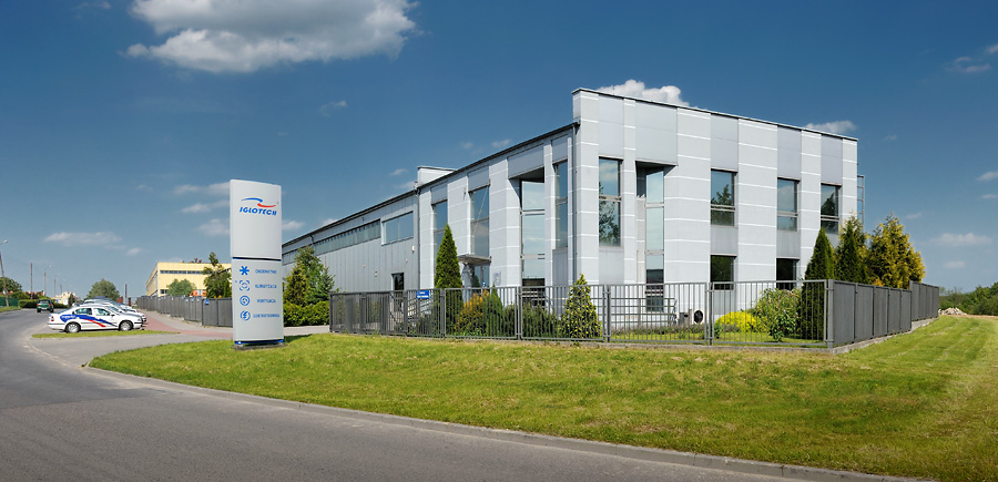 Siedziba Firmy P.H.U Iglotech Sp. J w Kwidzynie, ul. Toruńska 41